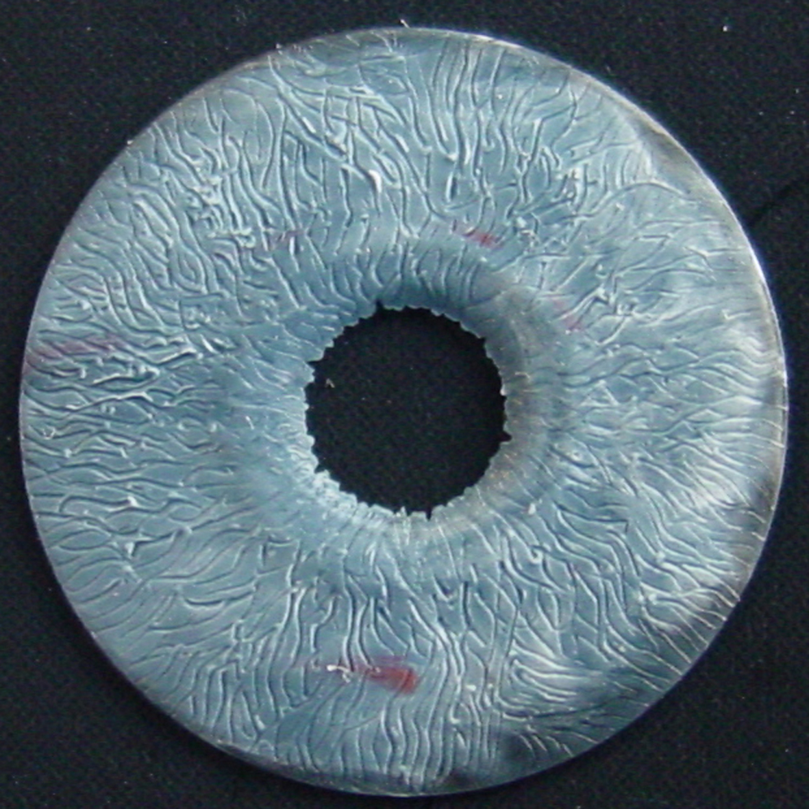 Beispiel einer Kunstiris (Irisprothese) zum vollständigen oder teilweisen Ersatz einer fehlenden oder durch Trauma geschädigten Iris